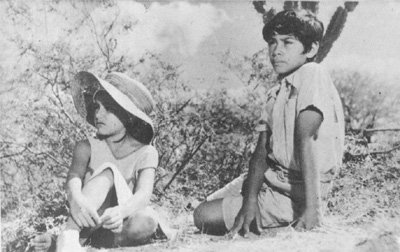 Foto dutante una escena de "Shunko", película dirigida por Lautaro Murúa (1960)